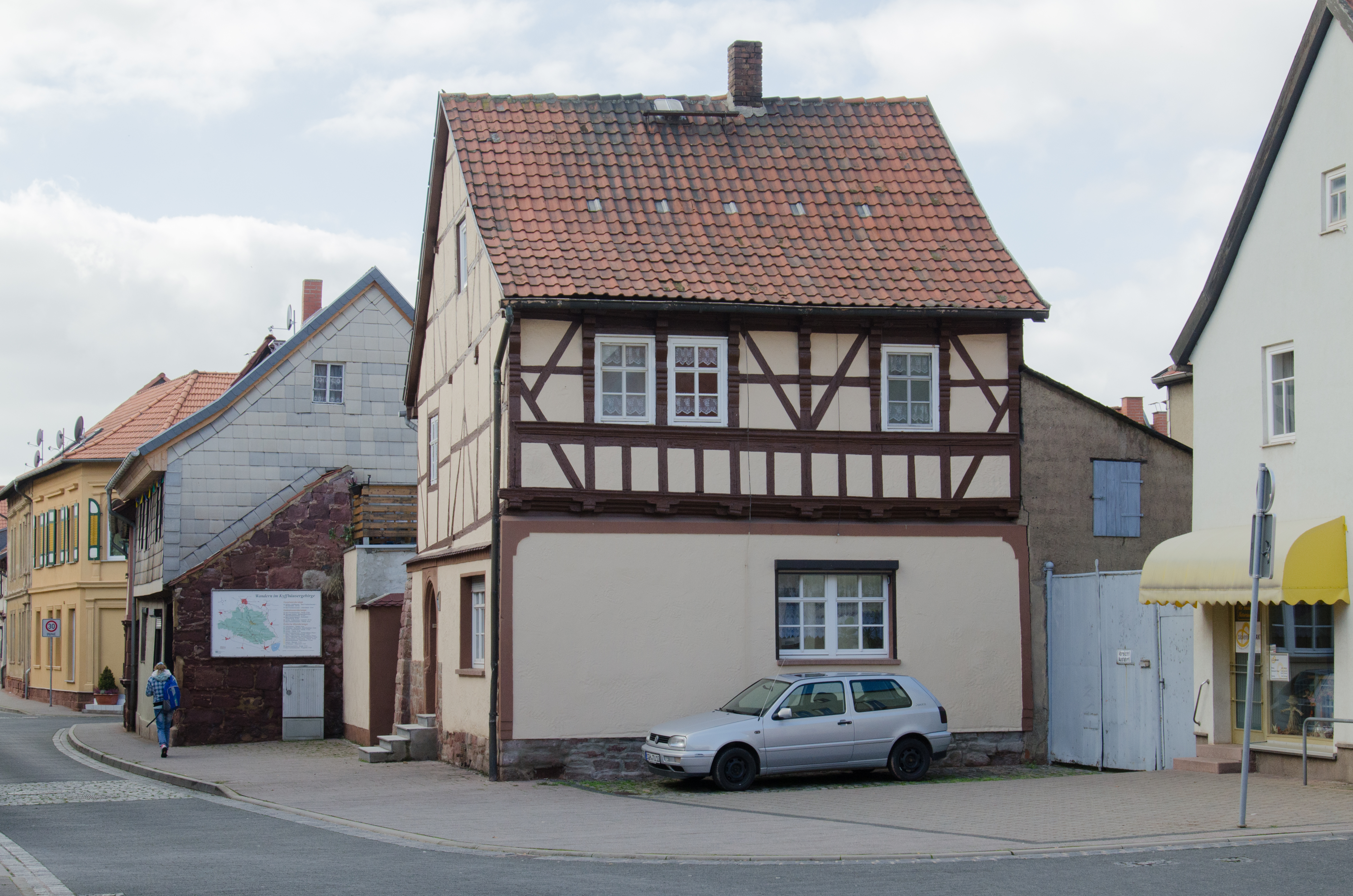 Kelbra, Lange Straße 46